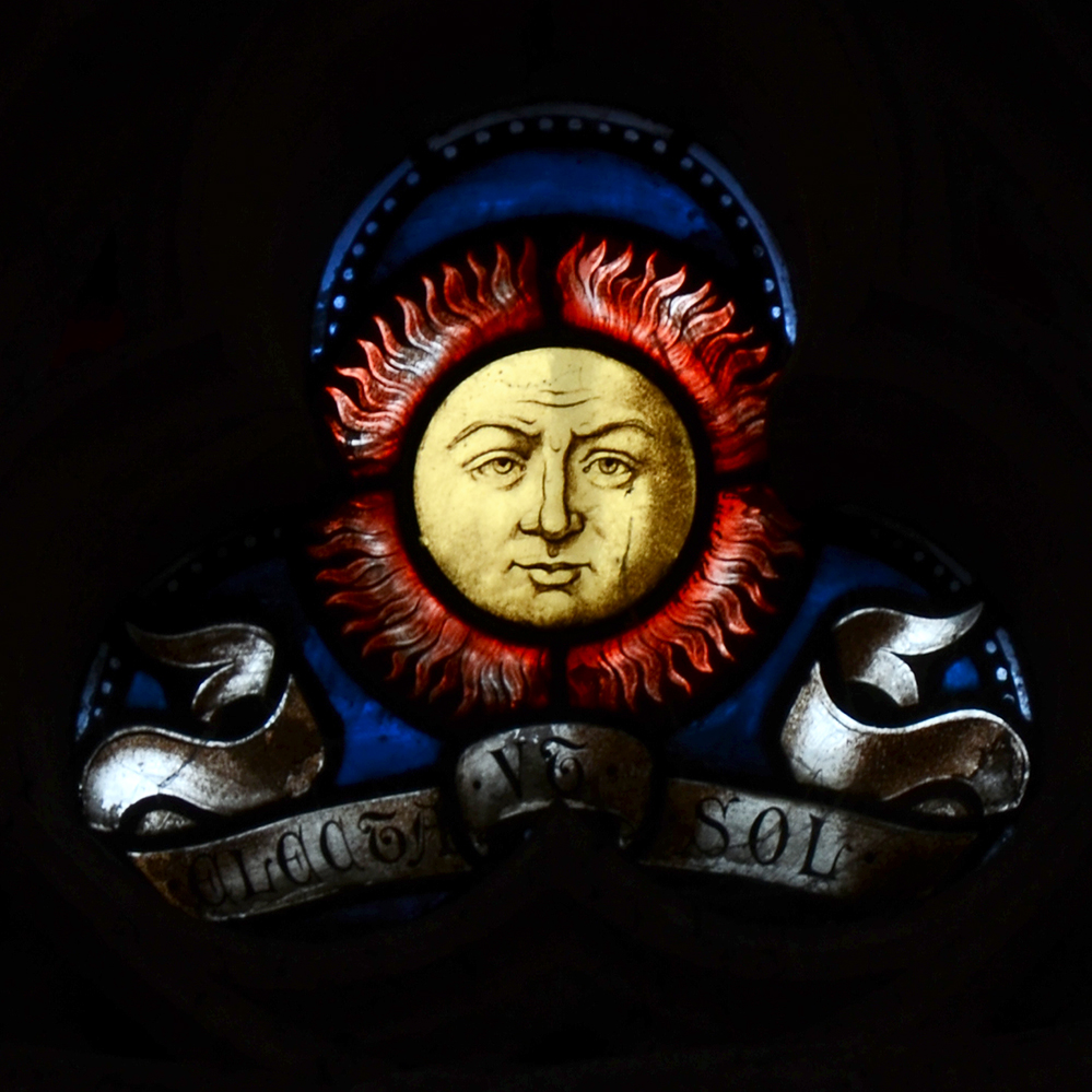 Vitrail de la basilique Notre-Dame de L'Epine : "Electa ut sol"( titre donné à la Vierge, tiré du Cantique des cantiques ).